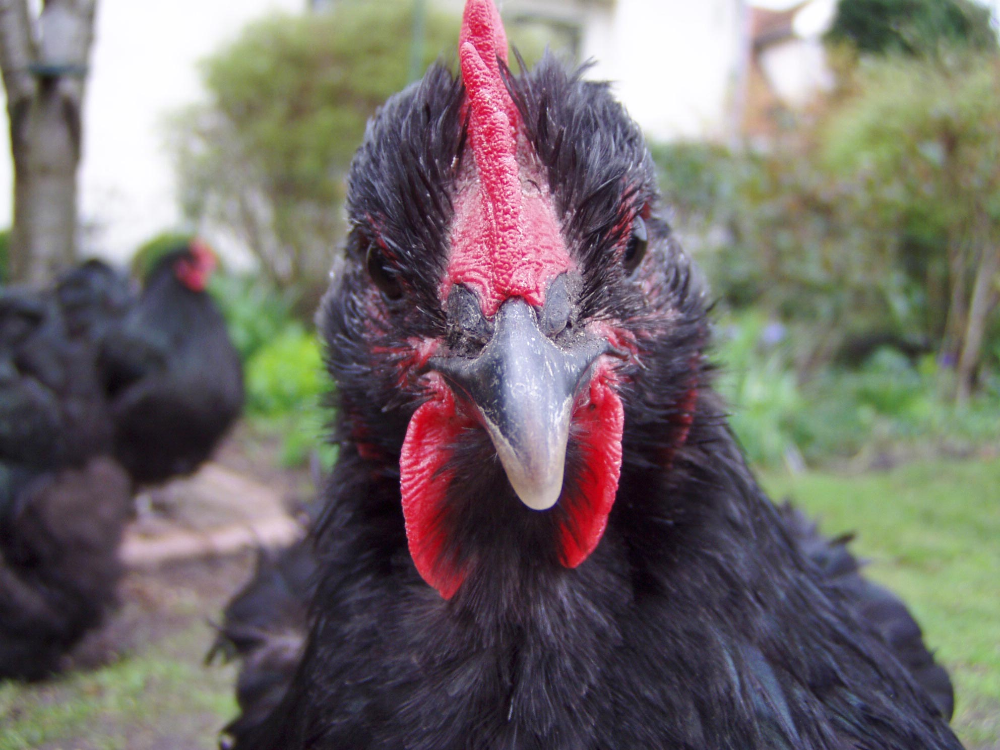 Foto gemaakt door Rex.